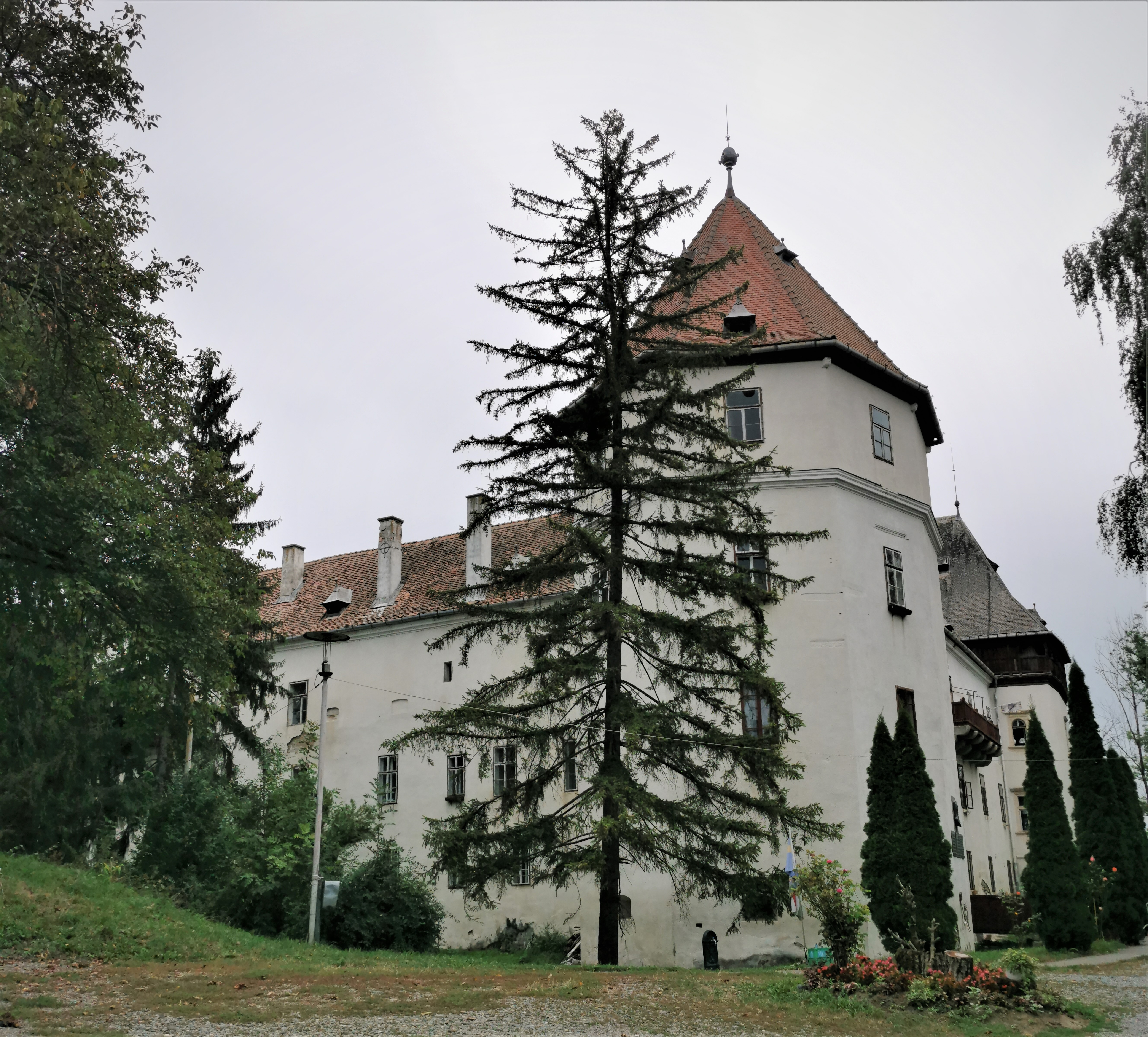 Kemény kastély - Marosvécs, 2019. szeptember 4-én.